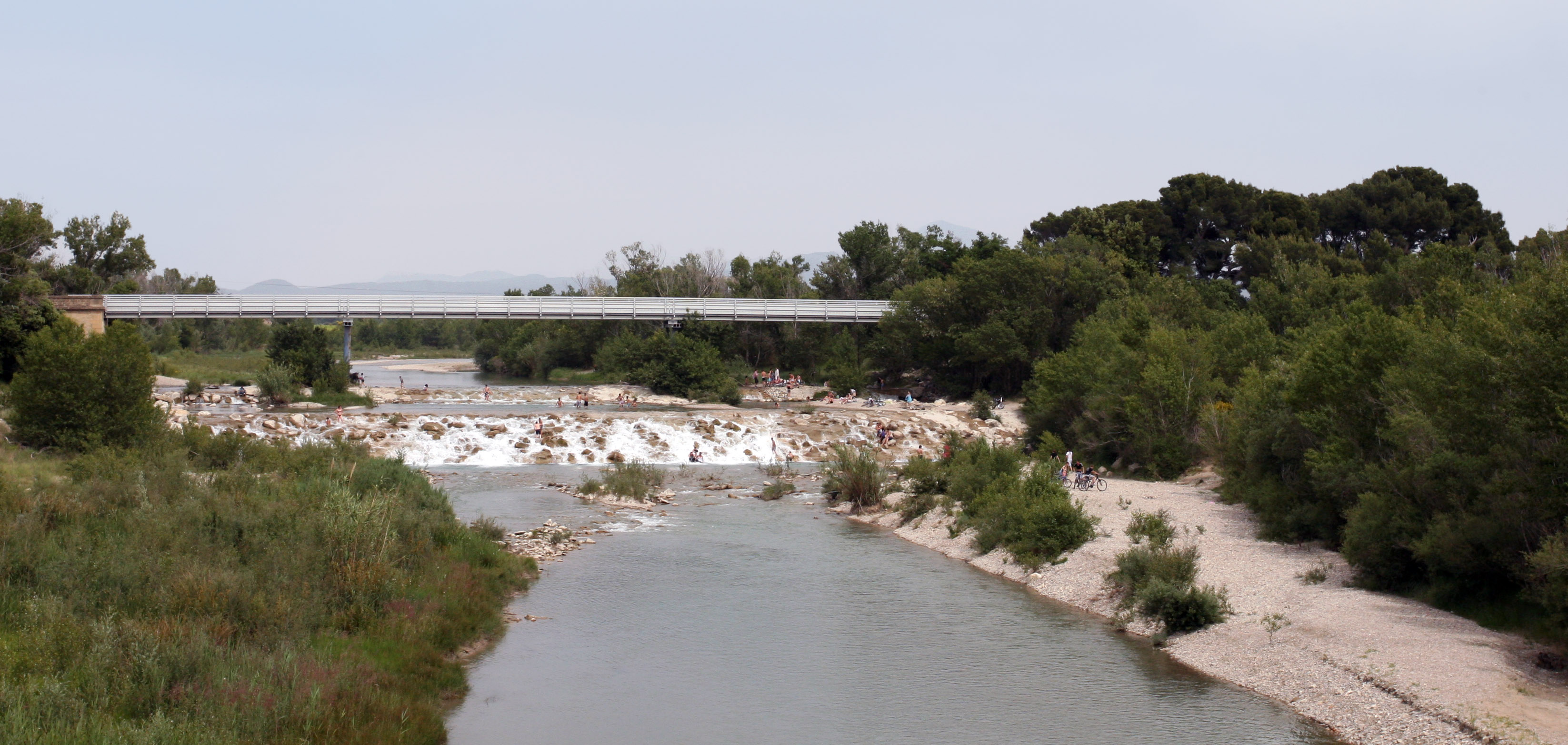 L'Aygues (proche de Camaret sur Aigues), Vaucluse